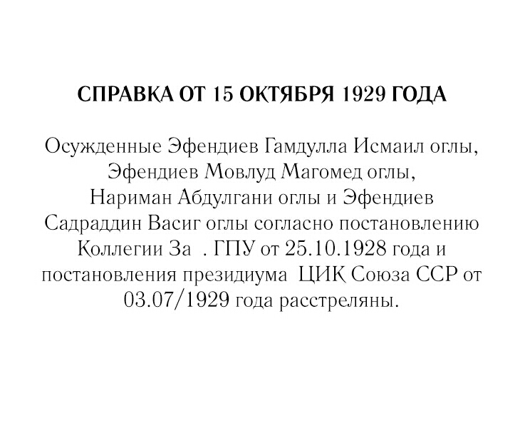 Həmdulla əfəndinin güllənməsi haqqında arayışın bir nüsxəsi